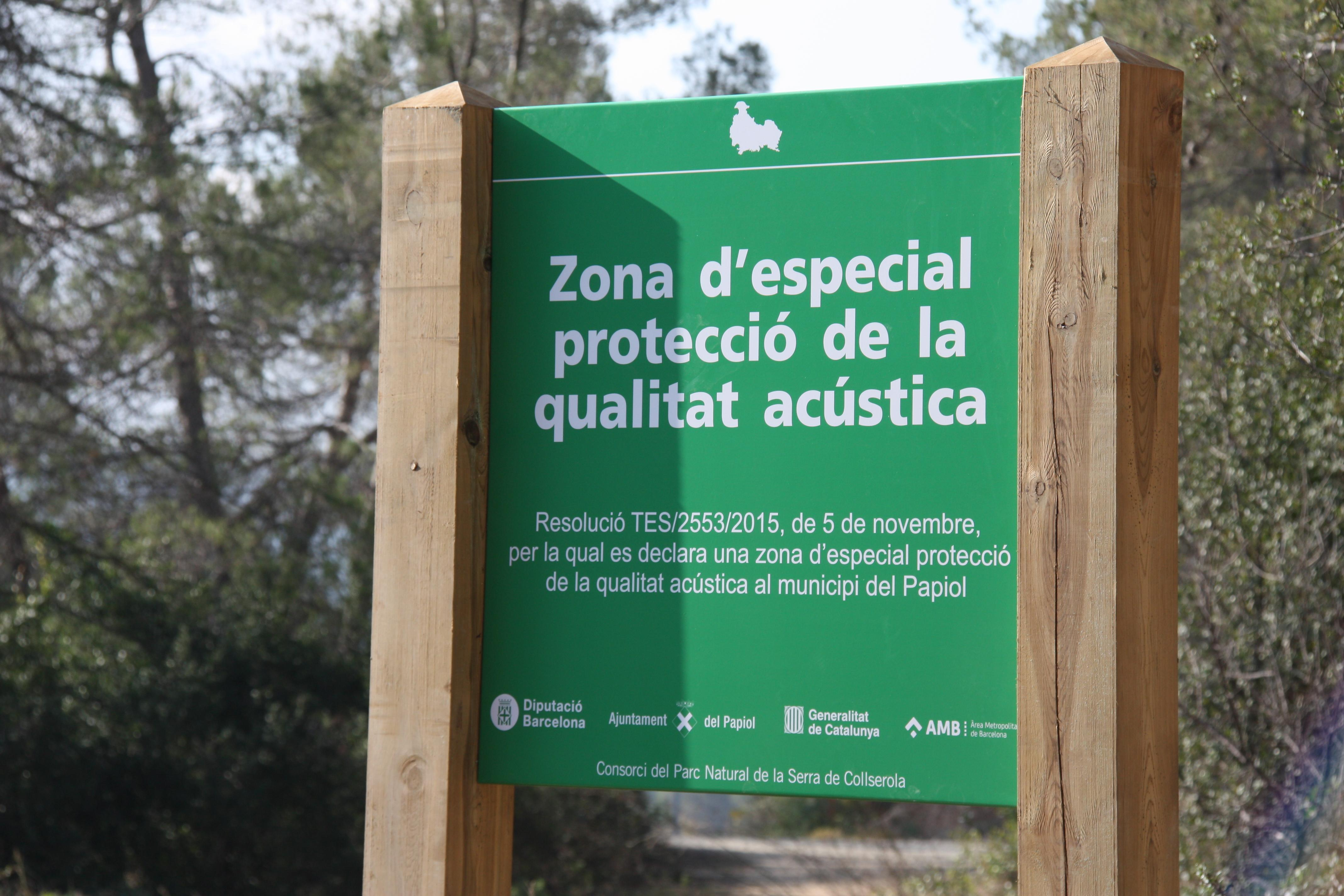 Panell informatiu de la primera zona d’especial protecció acústica de Catalunya